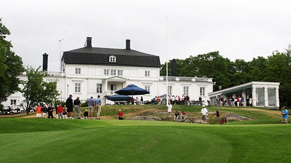 Nordcenterin Åminnen kartano